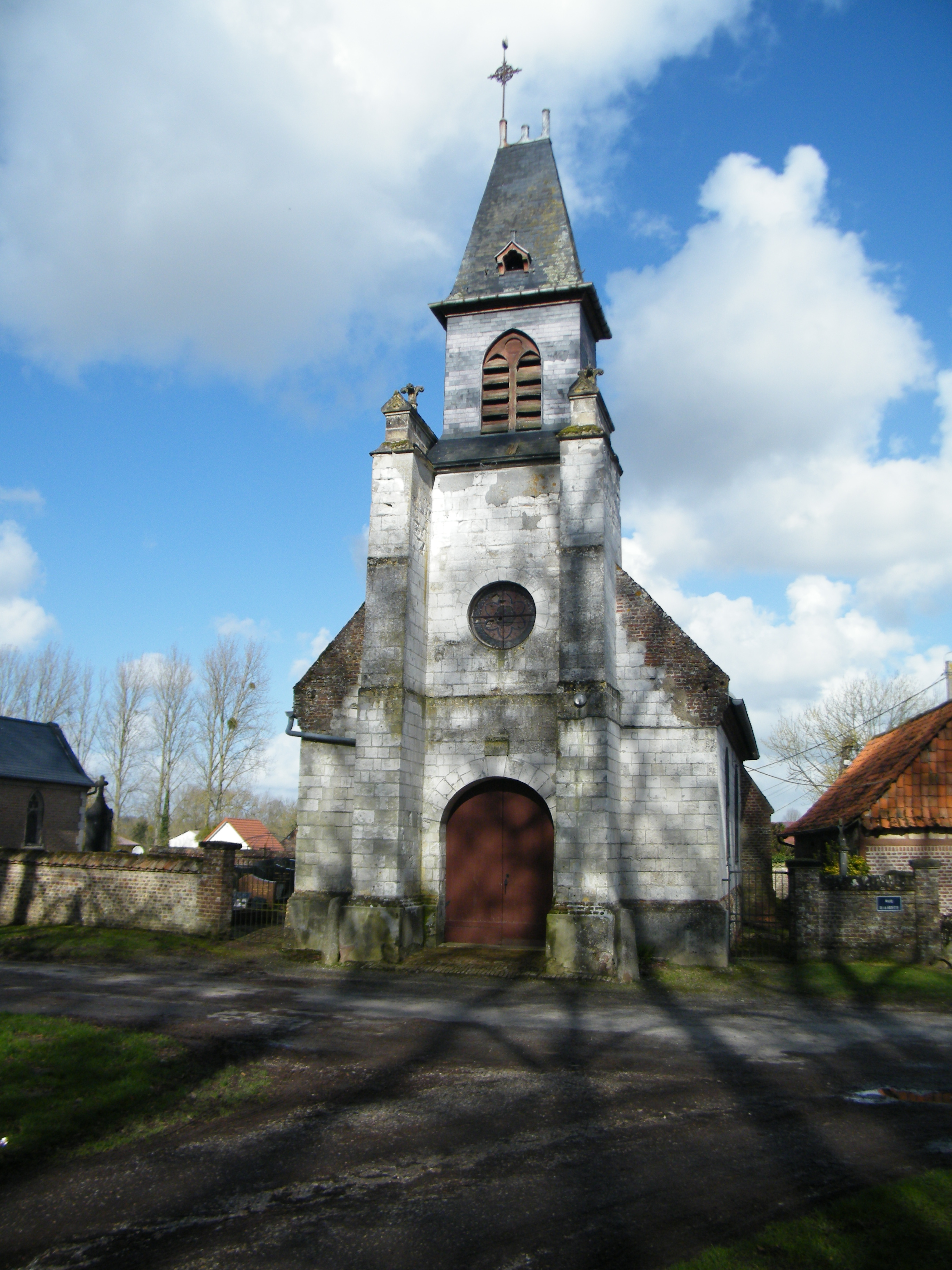 Le clocher de l'église de Froyelles, Somme, France.